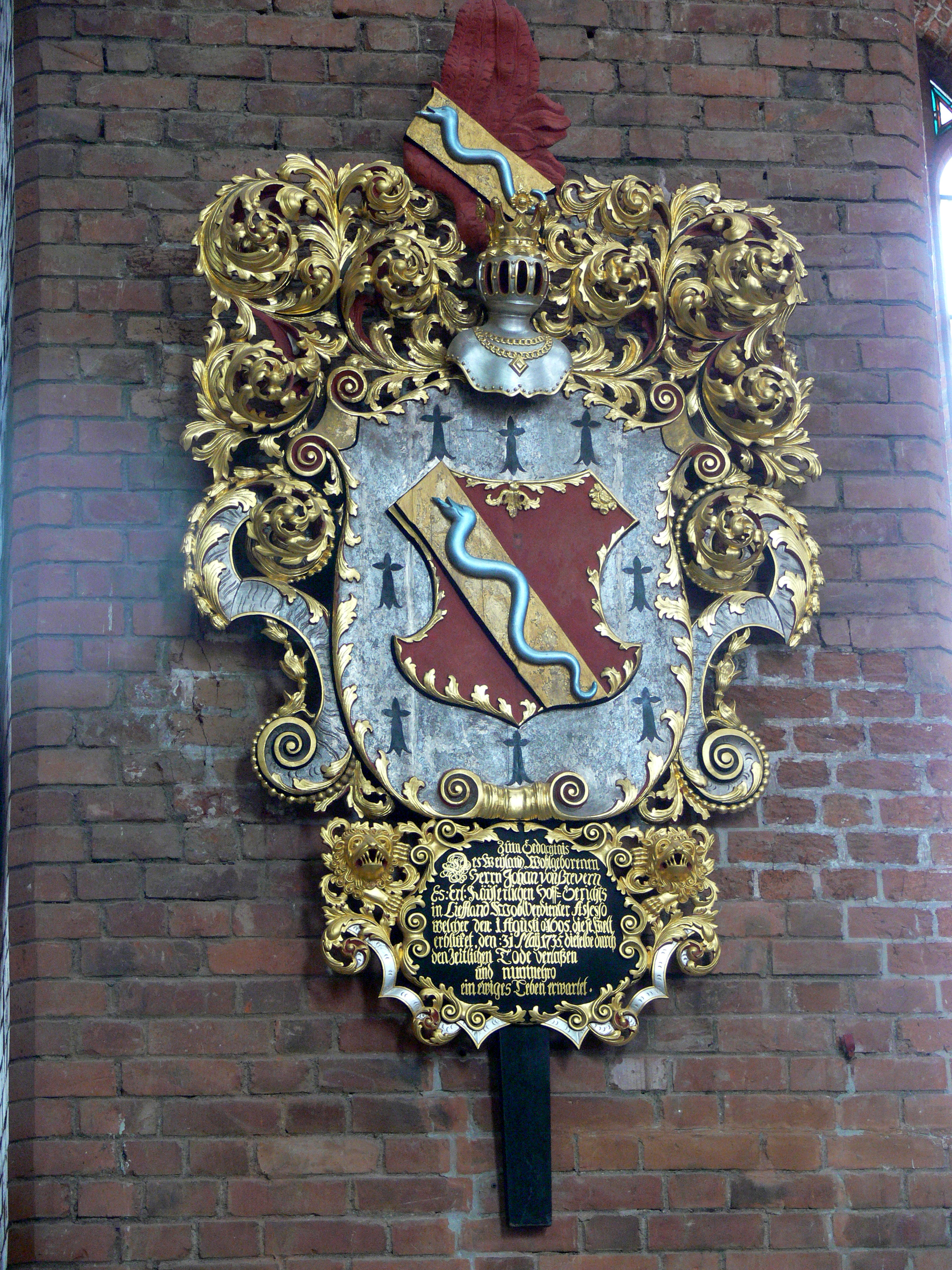 Coat of arms of Johann von Brevern (1695–1735), Kaiserlicher Hofgerichtsassessor in der Kirche St. Peter in Riga.